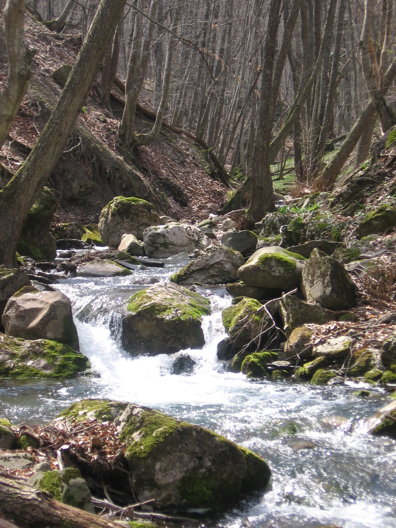 река Узень-Баш, Крым